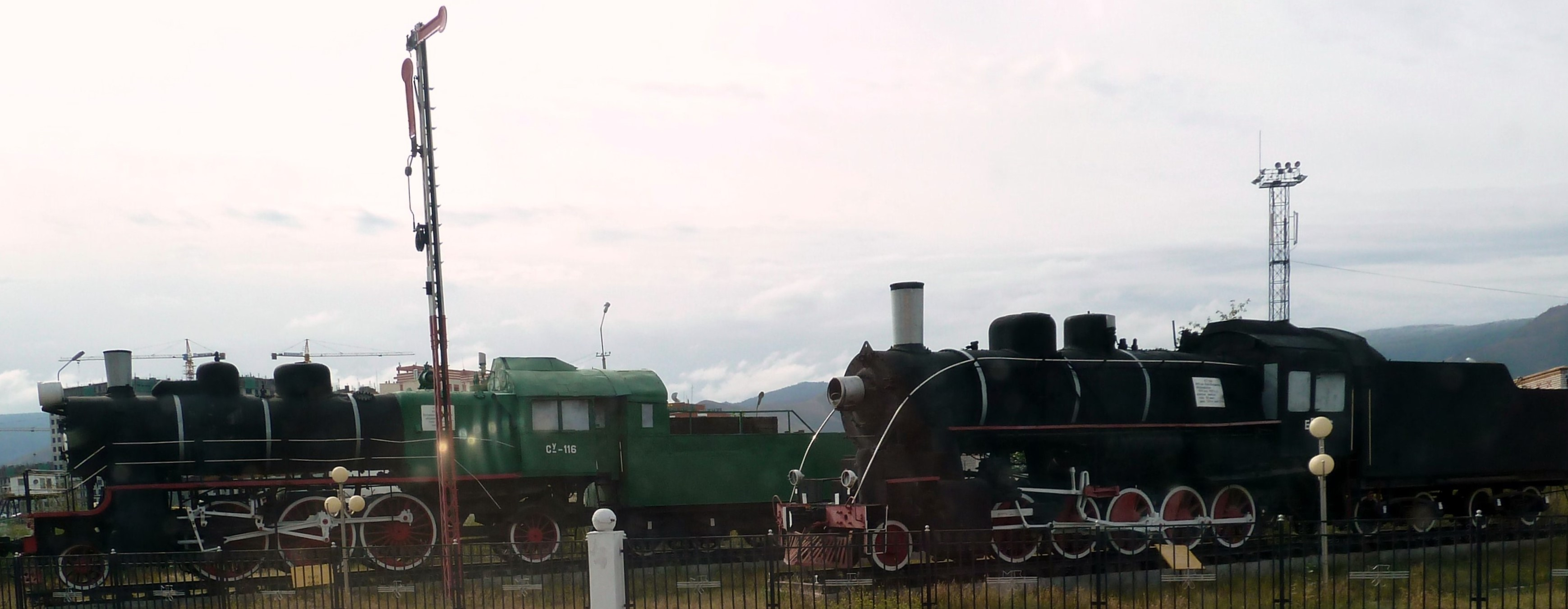 Transport ferroviaire en Mongolie, en Mongolie.